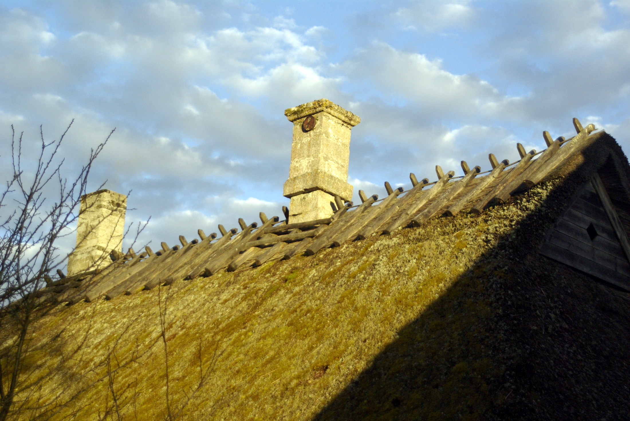 Rookatus madalas õhtuvalguses, Koguva